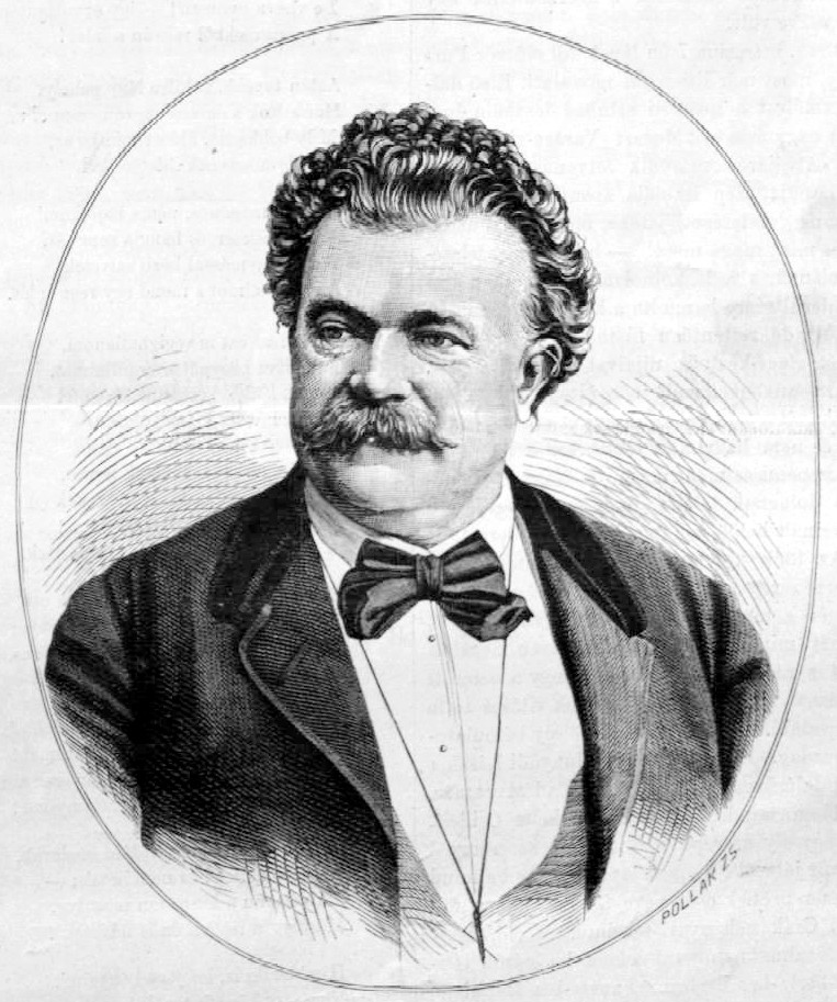 Kőszeghy Károly (1820–1891) színész, operaénekes (bariton) portréja. Pollák Zsigmond metszete